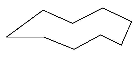 Циклононан. Одна из наиболее энергетически выгодных конформаций.